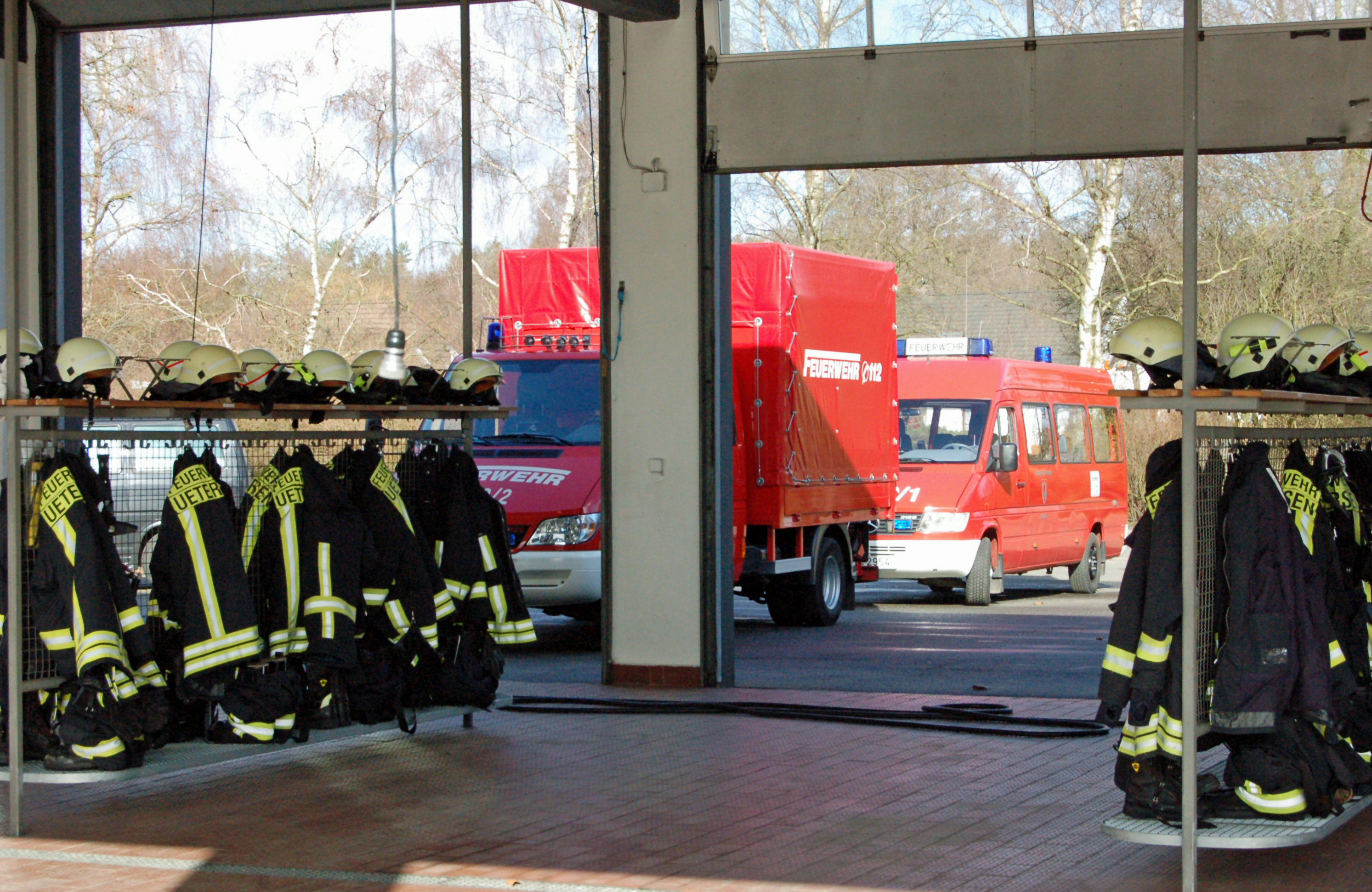 Die Fahrzeughalle der Feuerwehrwache in Uetersen, im Hintergrund noch einigen Feuerwehrfahrzeuge